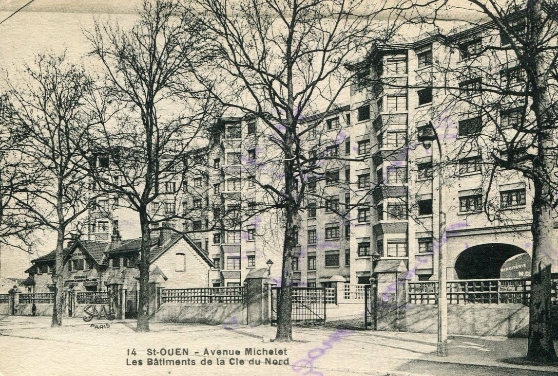 Saint-Ouen.Avenue Michelet.Arbres